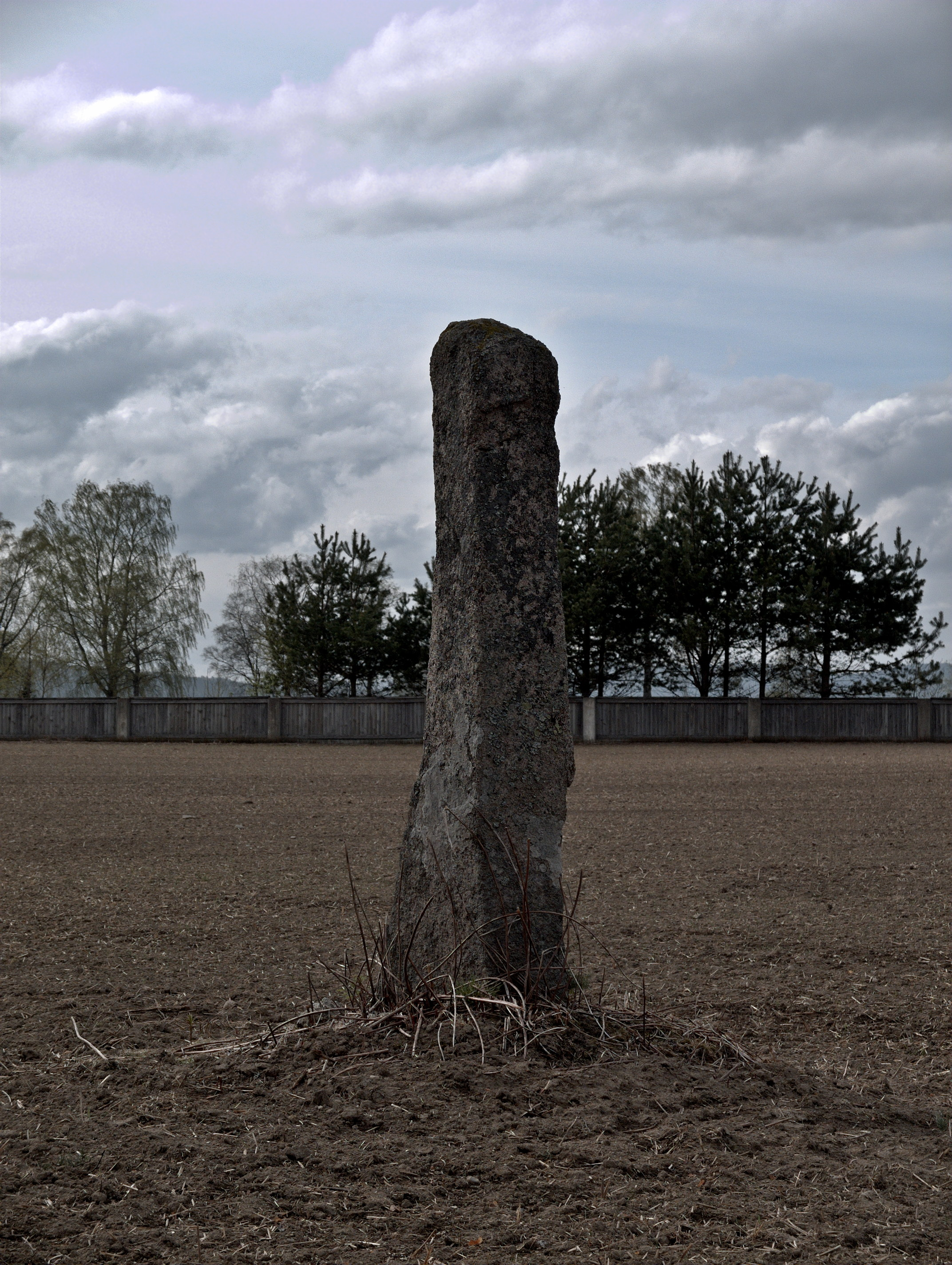 Vigsteinen i Nannestad.